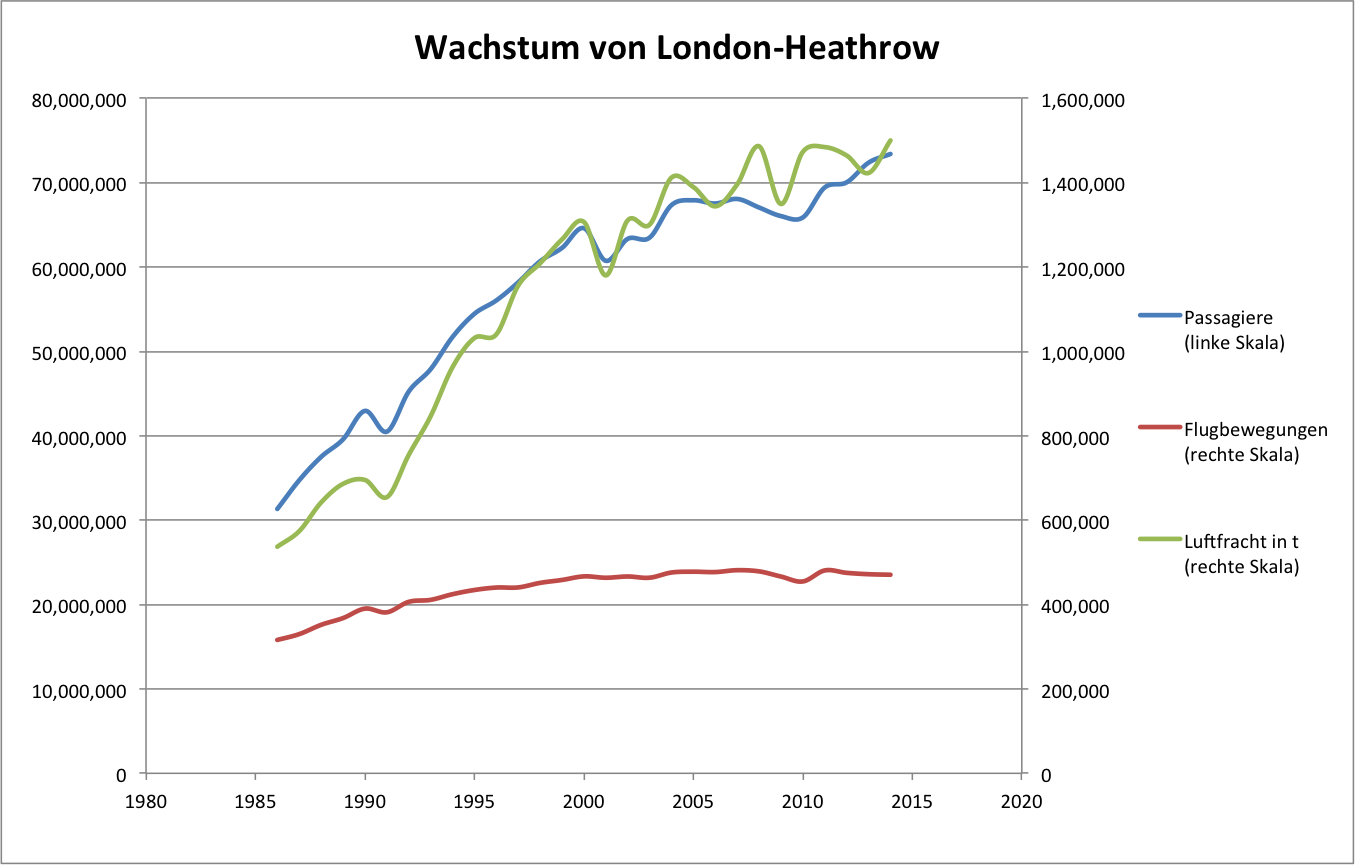 Veranschaulichung des Wachstums vom Flughafen London Heathrow zwischen 1986 und 2012